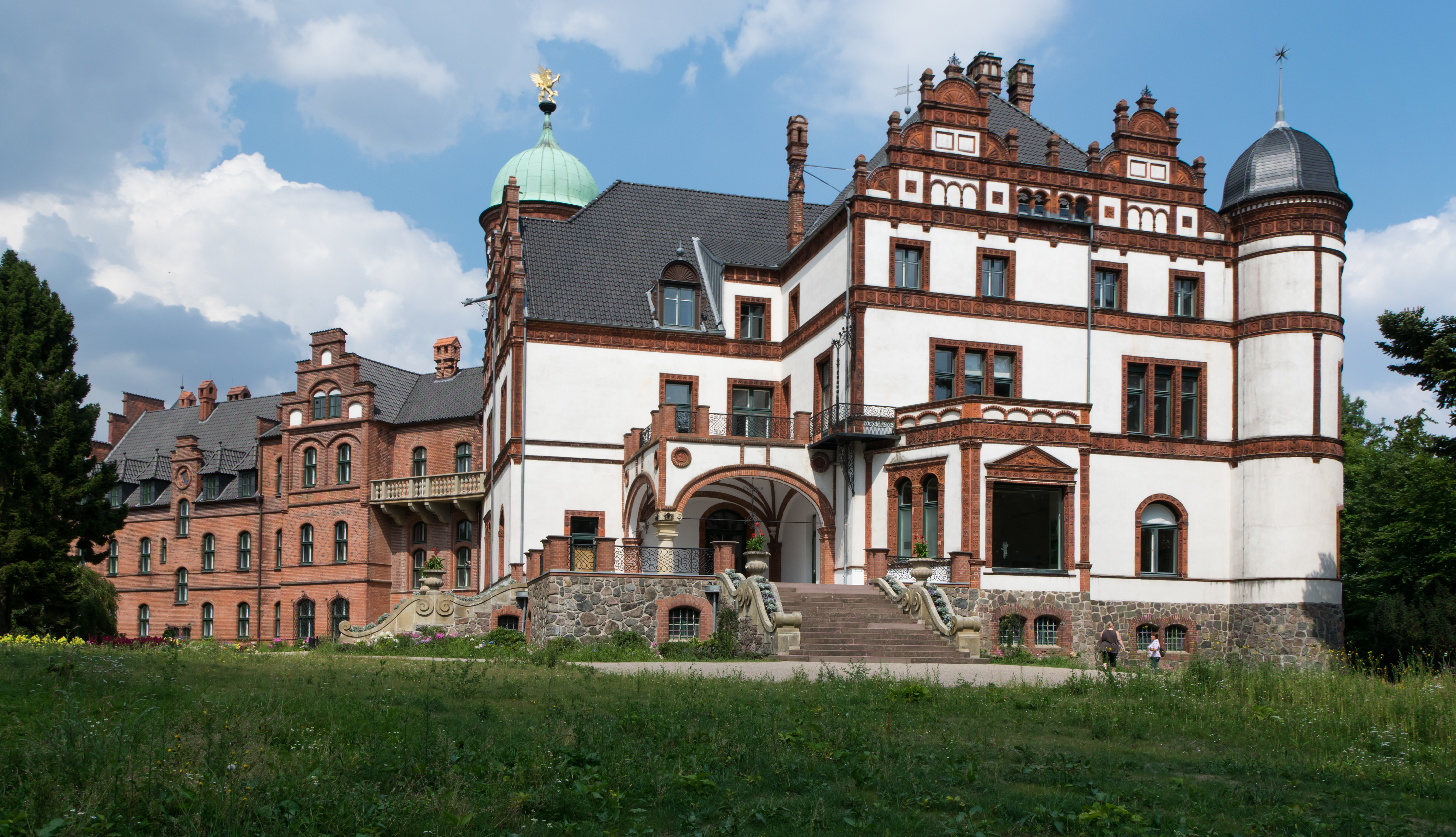 Lübstorf Schloss Wiligrad Südseite